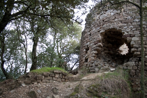 castell de Clarà a Moià - Catalunya